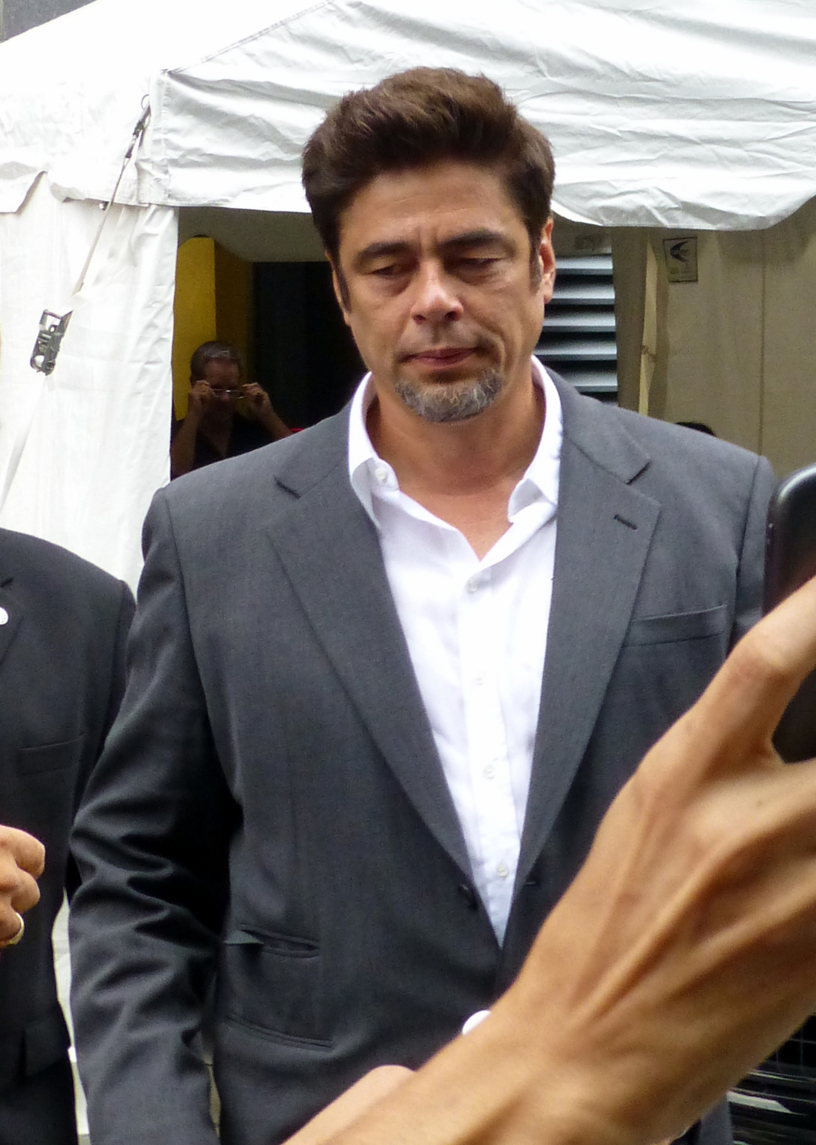 Benicio Del Toro at Escobar Paradise Lost press conference, 2014 Toronto Film Festival